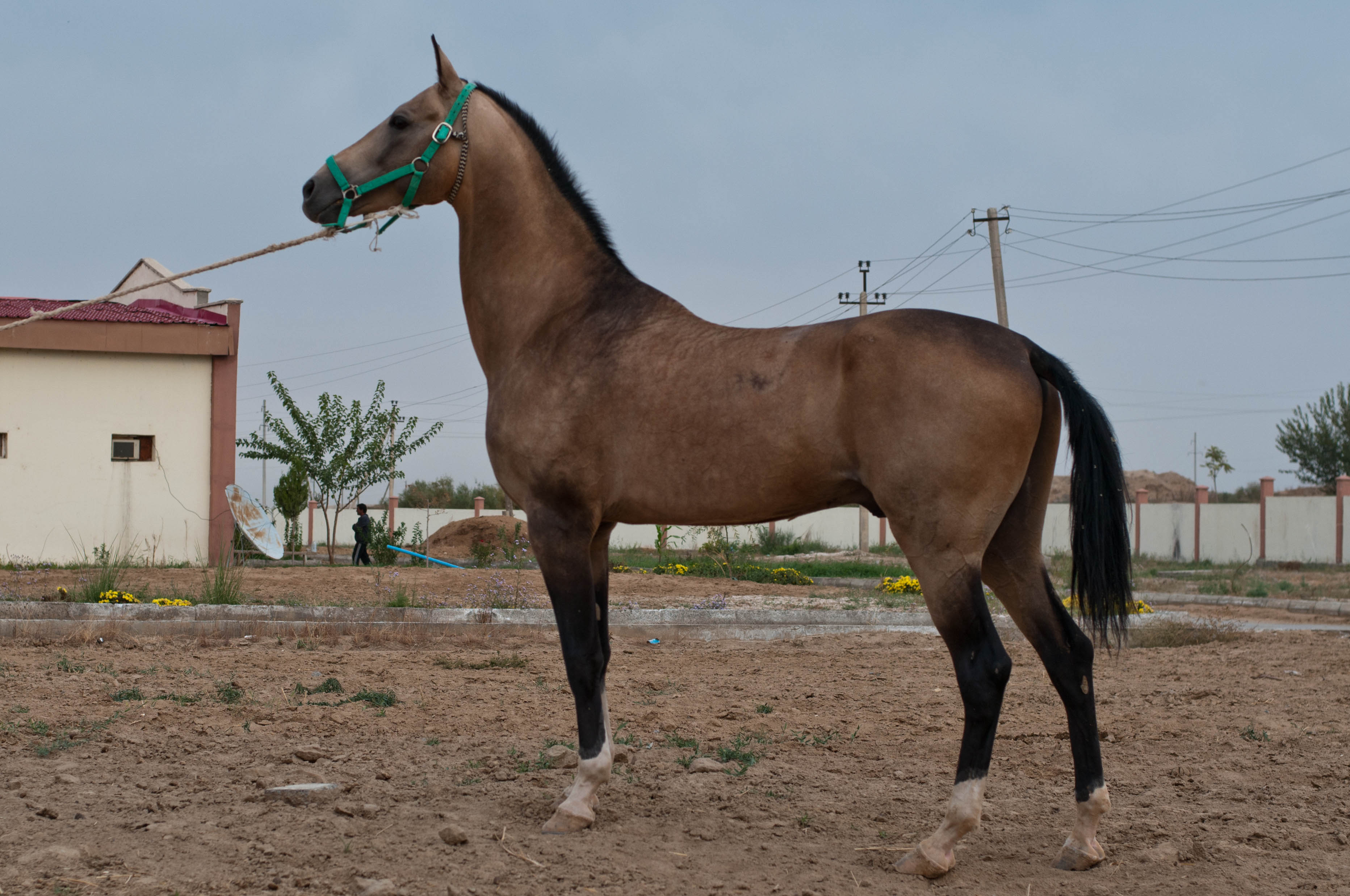 Studfarm in Turkmenistan